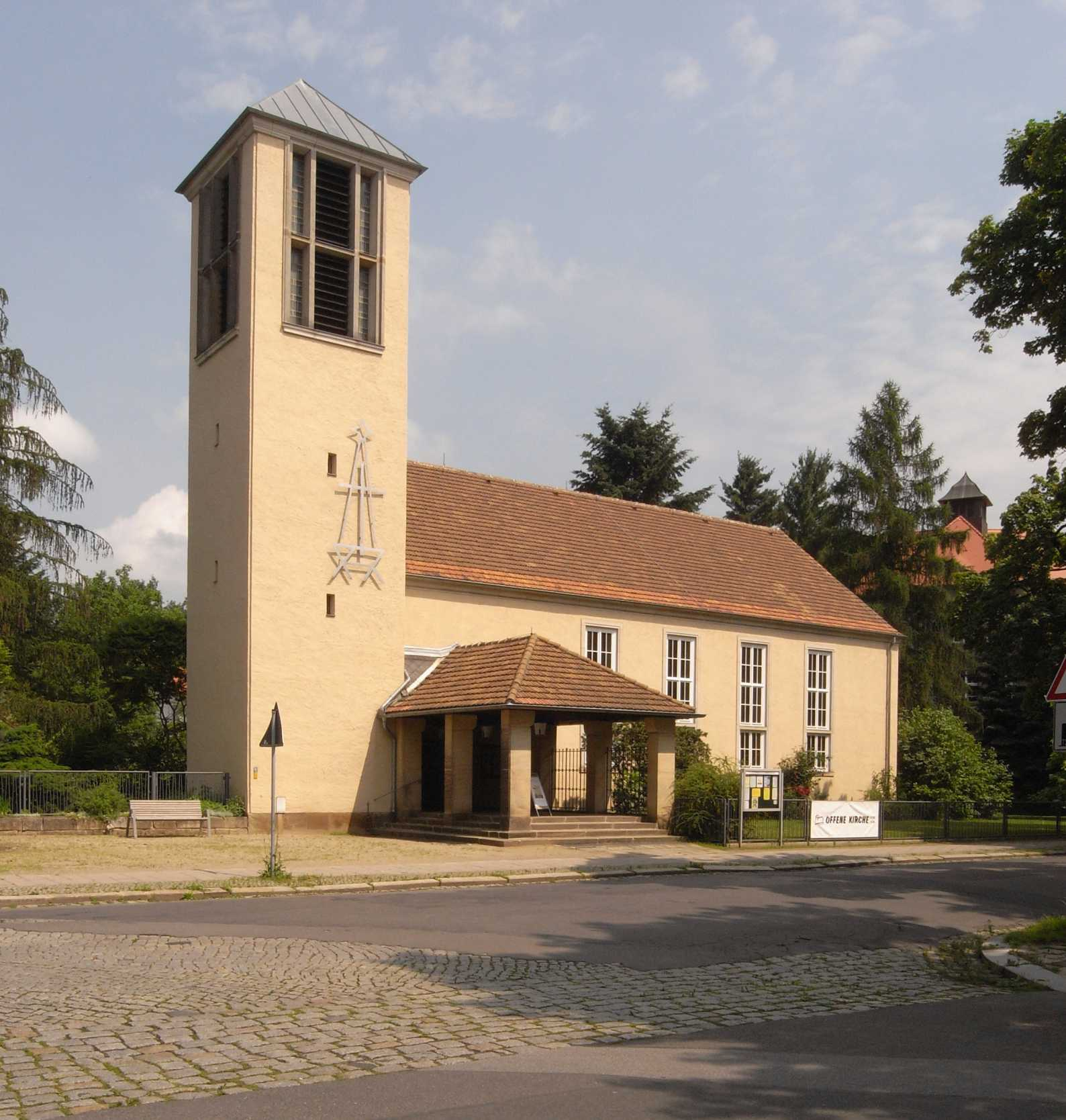 Bethlehemkirche Dresden im Stadtteil Tolkewitz (Sachsen, Deutschland)